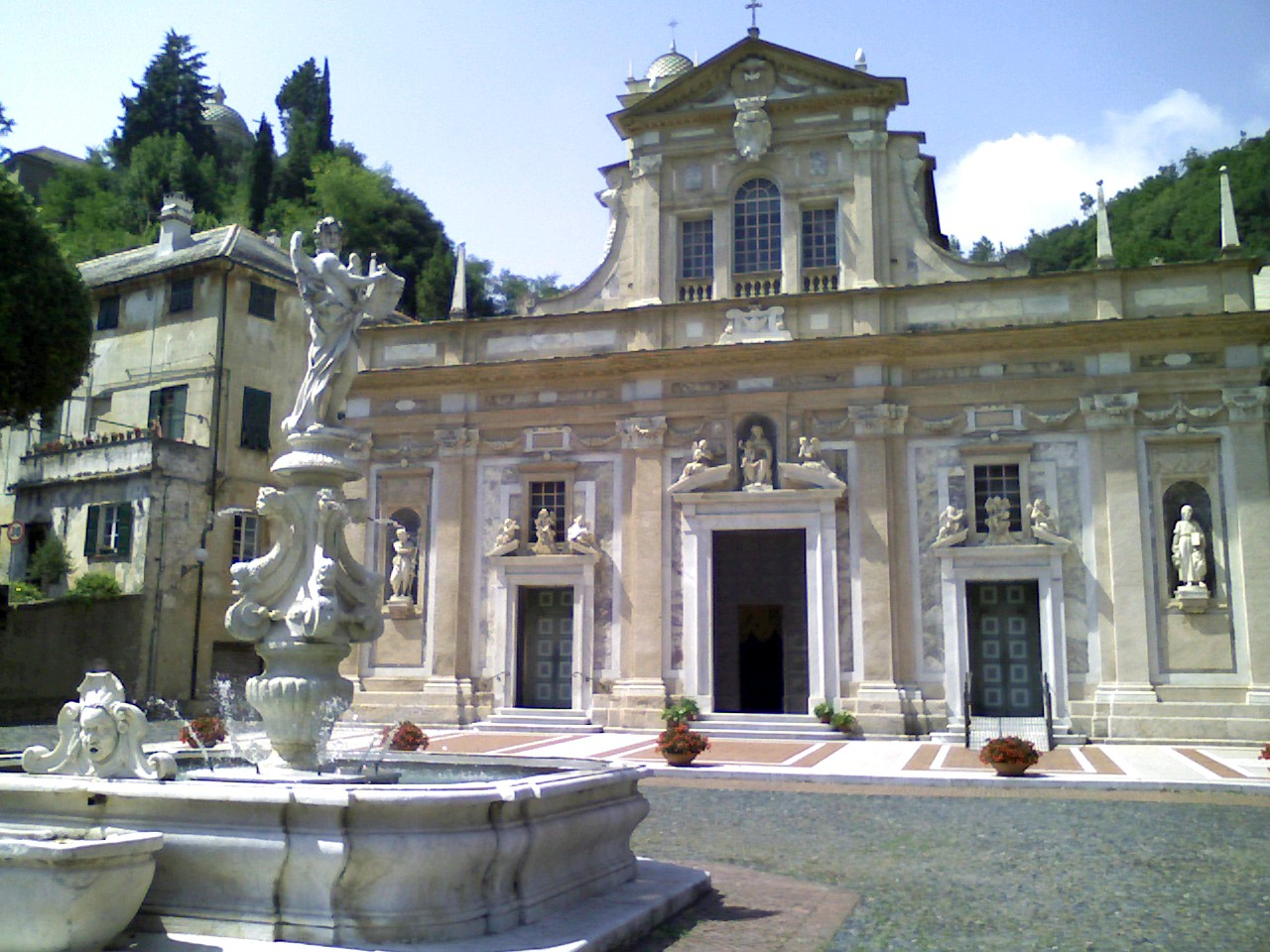 Piazza del Santuario di Savona (Italy)